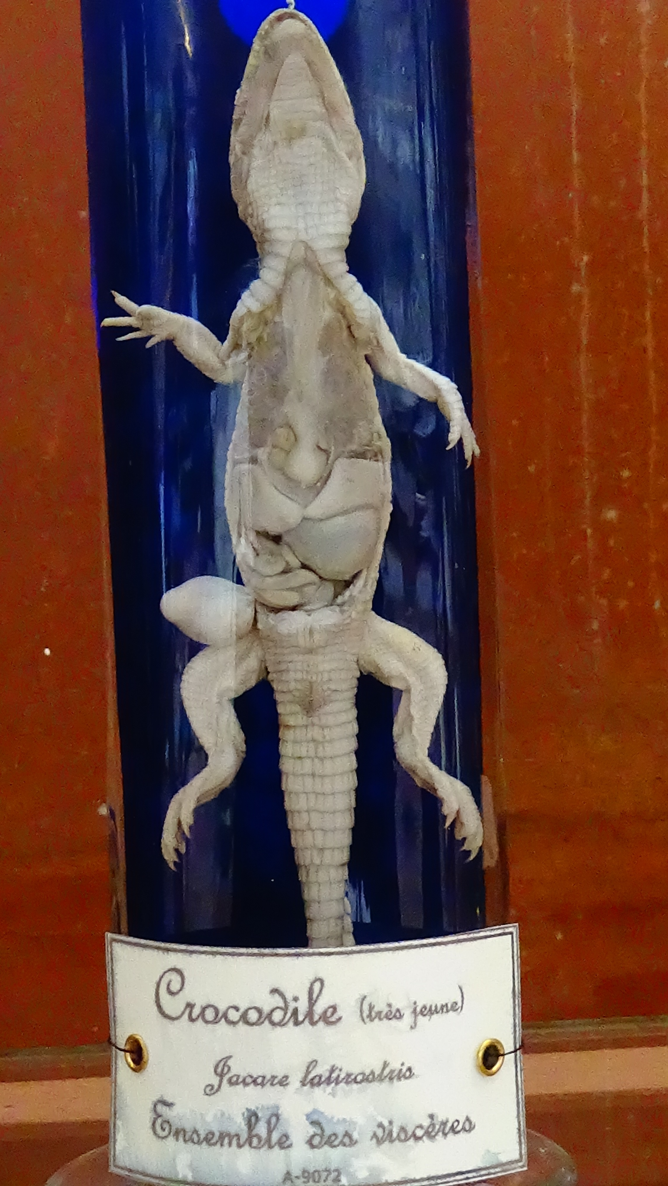 Caiman latirostris - Yacare latirostris - Ensemble des viscères - mnhn Paris